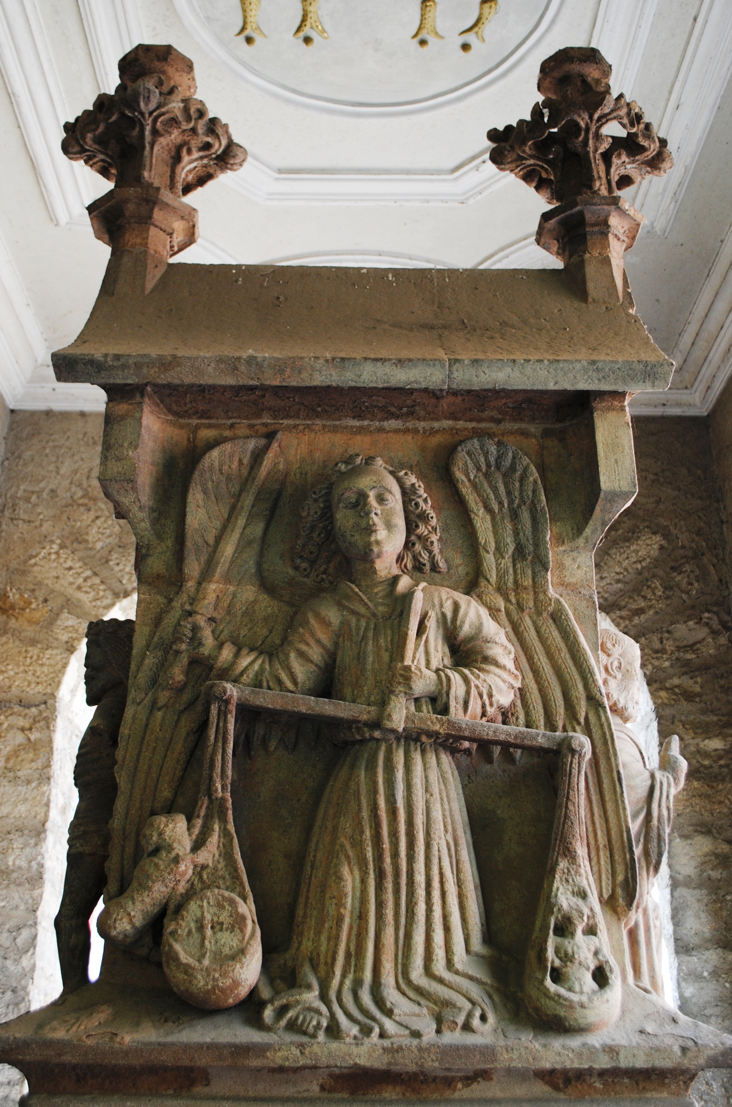 Rückseite, Bildstock, Josef-Wächter-Straße, Volkach